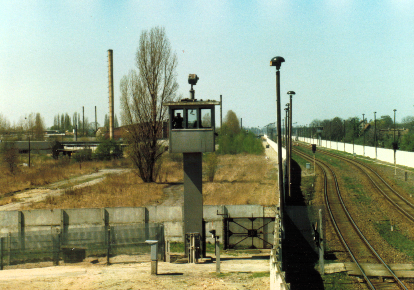 Grenzsicherung Berliner Mauer in Berlin-Staaken